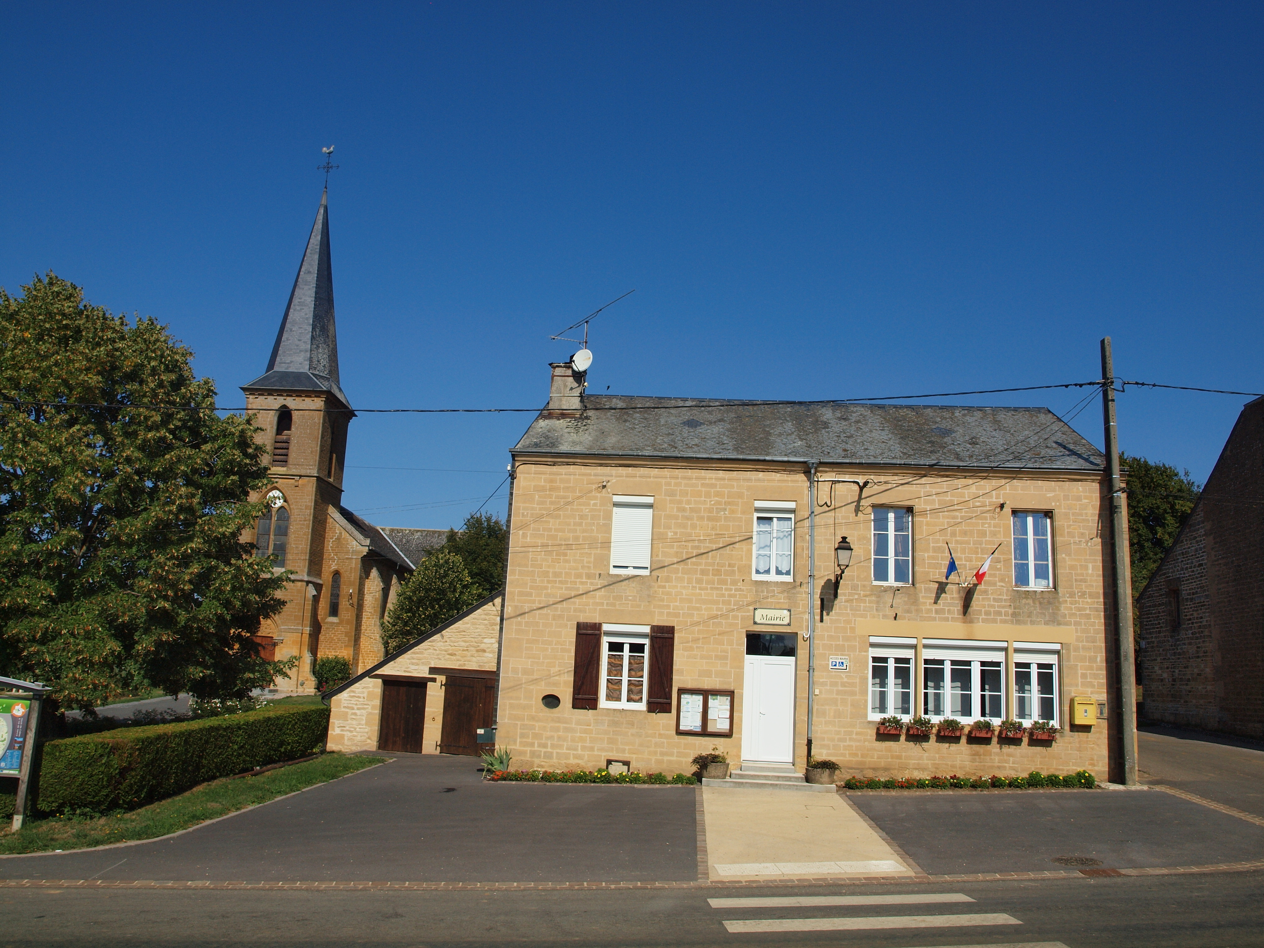 Mairie de Villers-le-Tilleul (Ardennes, France)